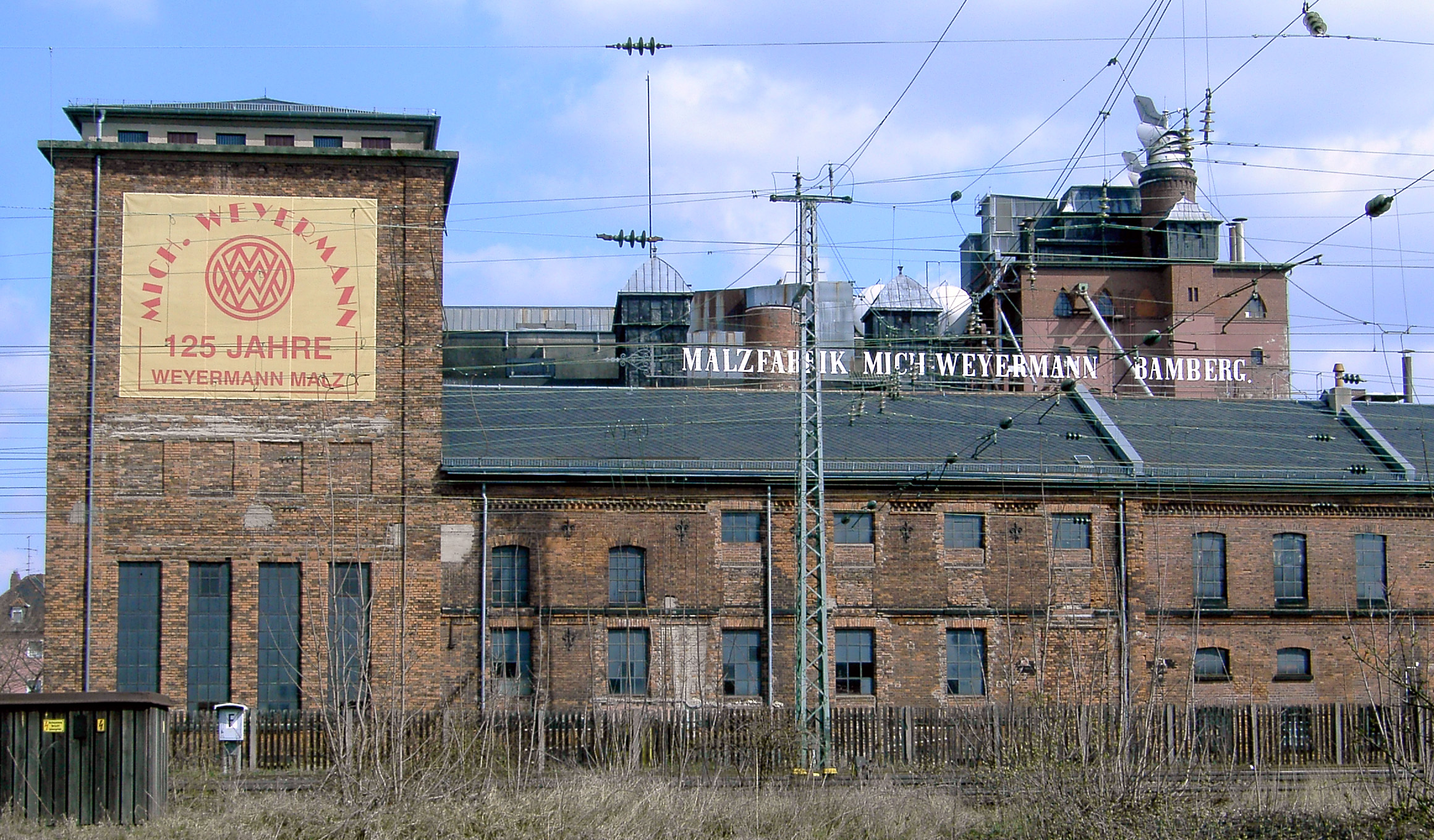 Malzfarbrik Mich. Weyermann, Brennerstraße, Bamberg